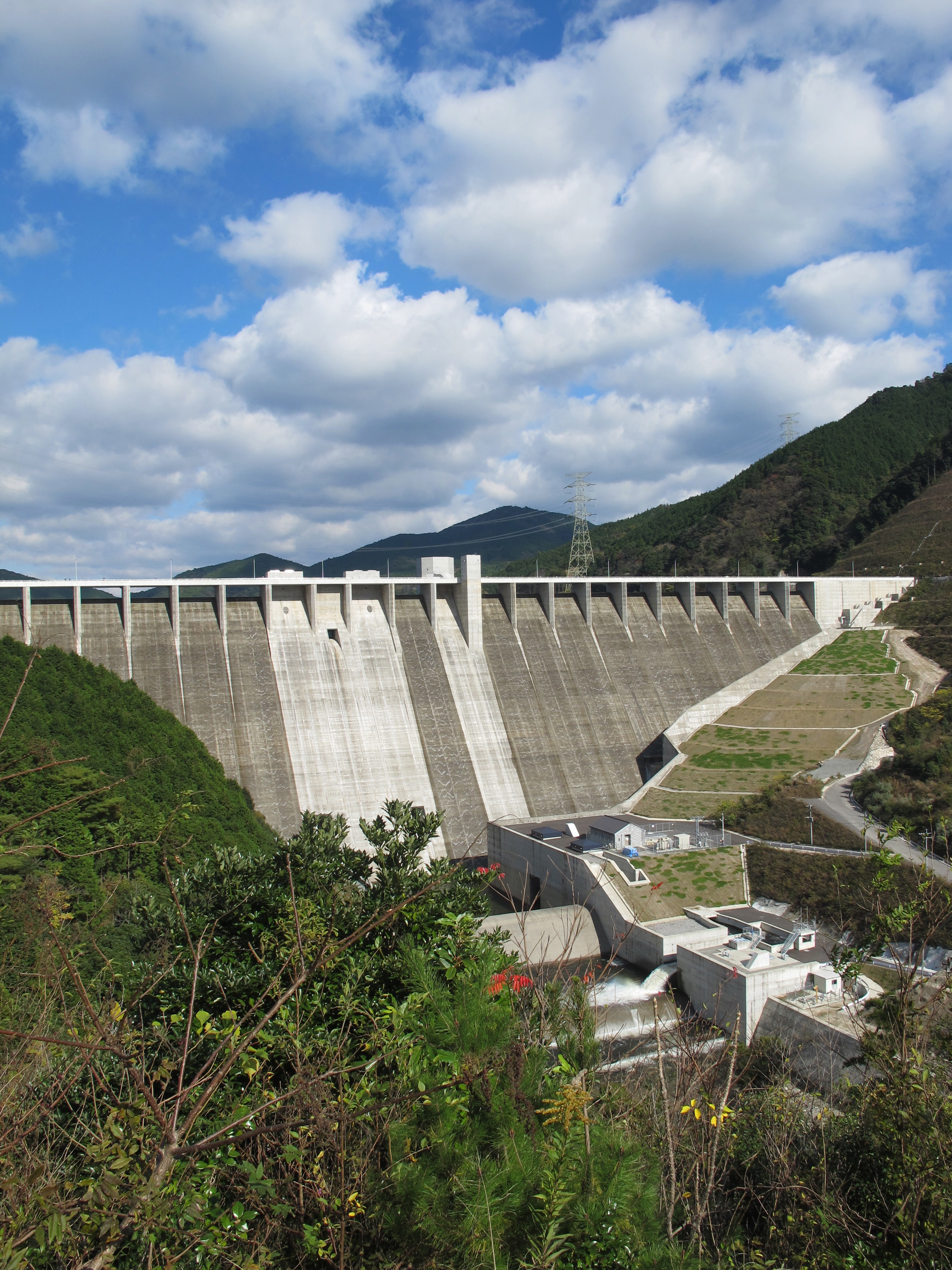 嘉瀬川ダムの非常用洪水吐から越流している様子（試験湛水）